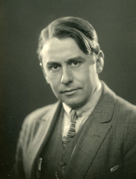 Chefdirigent for Aarhus By-orkester